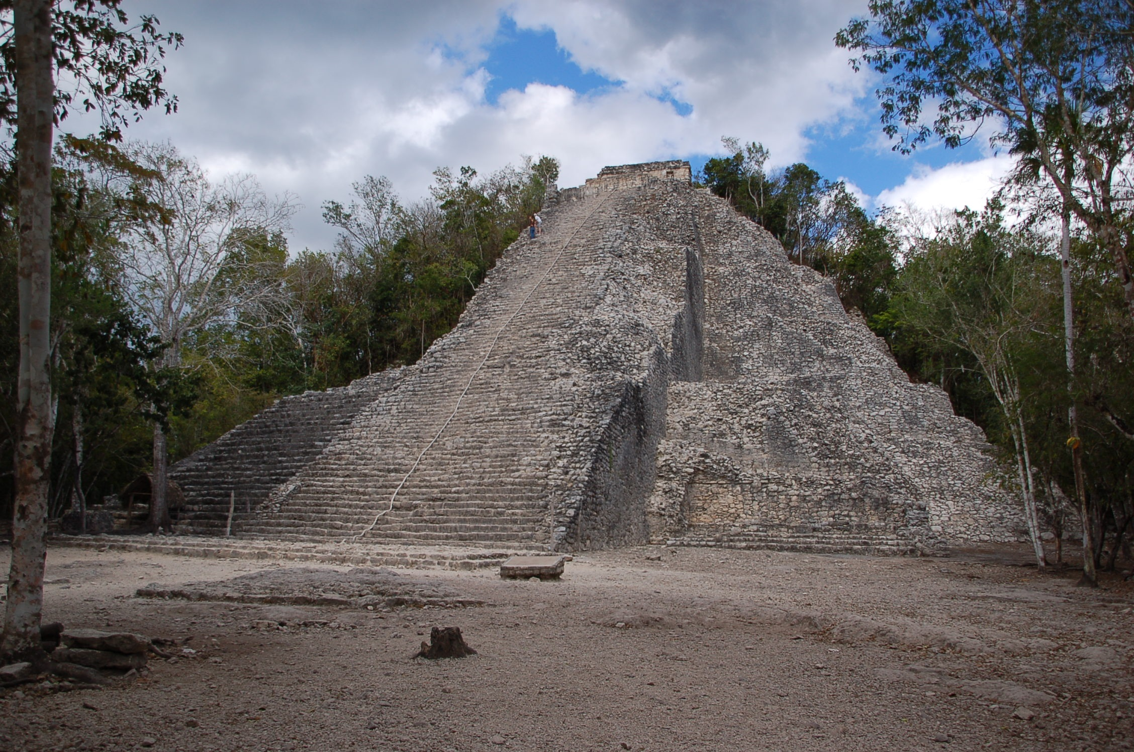 42 m de hauteur, site de Coba, Yucatán, Mexique